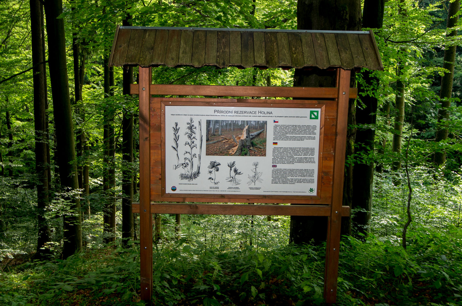 Přírodní rezervace Holina, informační tabule, Slavkovský les, okres Cheb